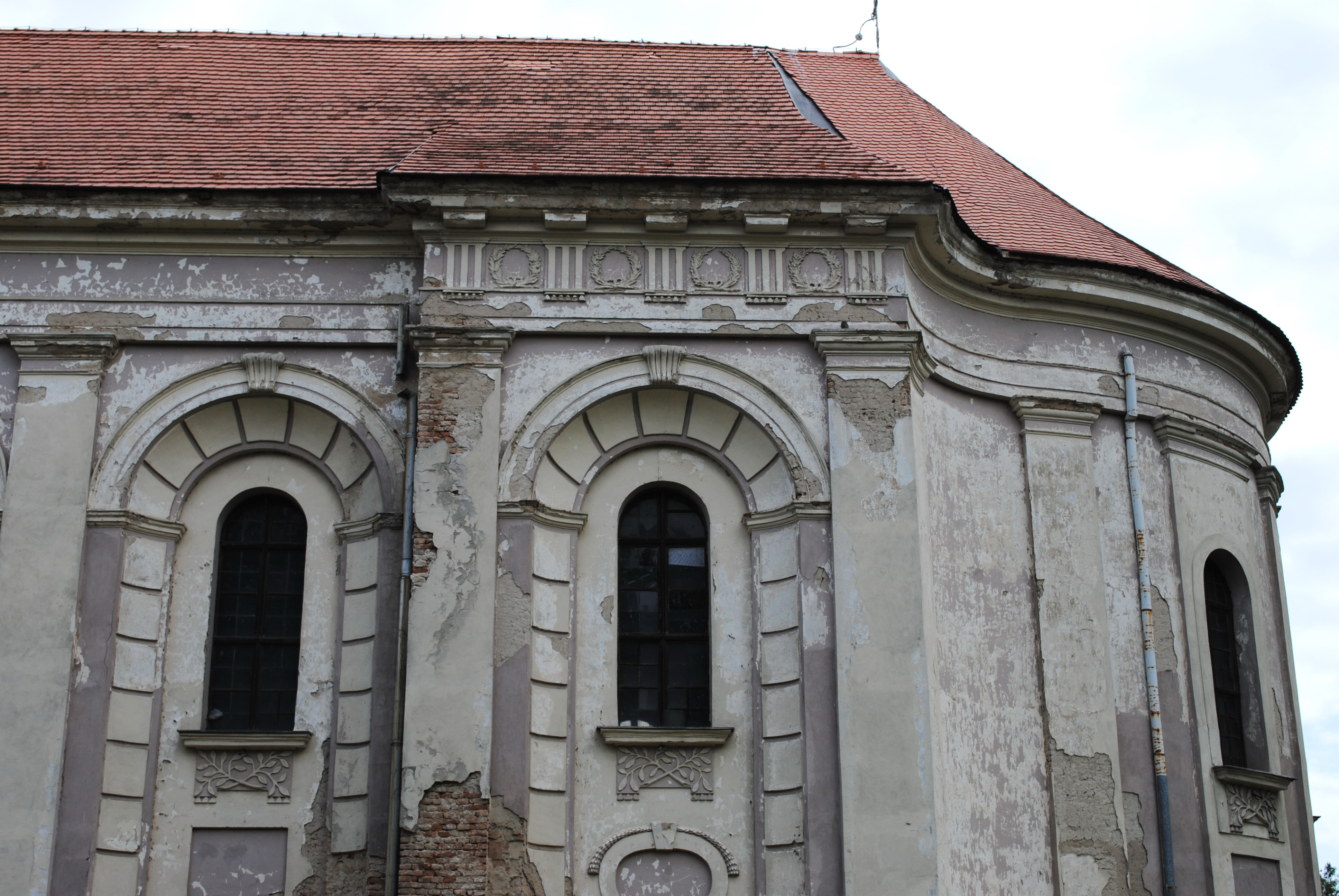 Srpski (latinica): Srpska pravoslavna crkva Svetog oca Nikolaja u Bašaidu